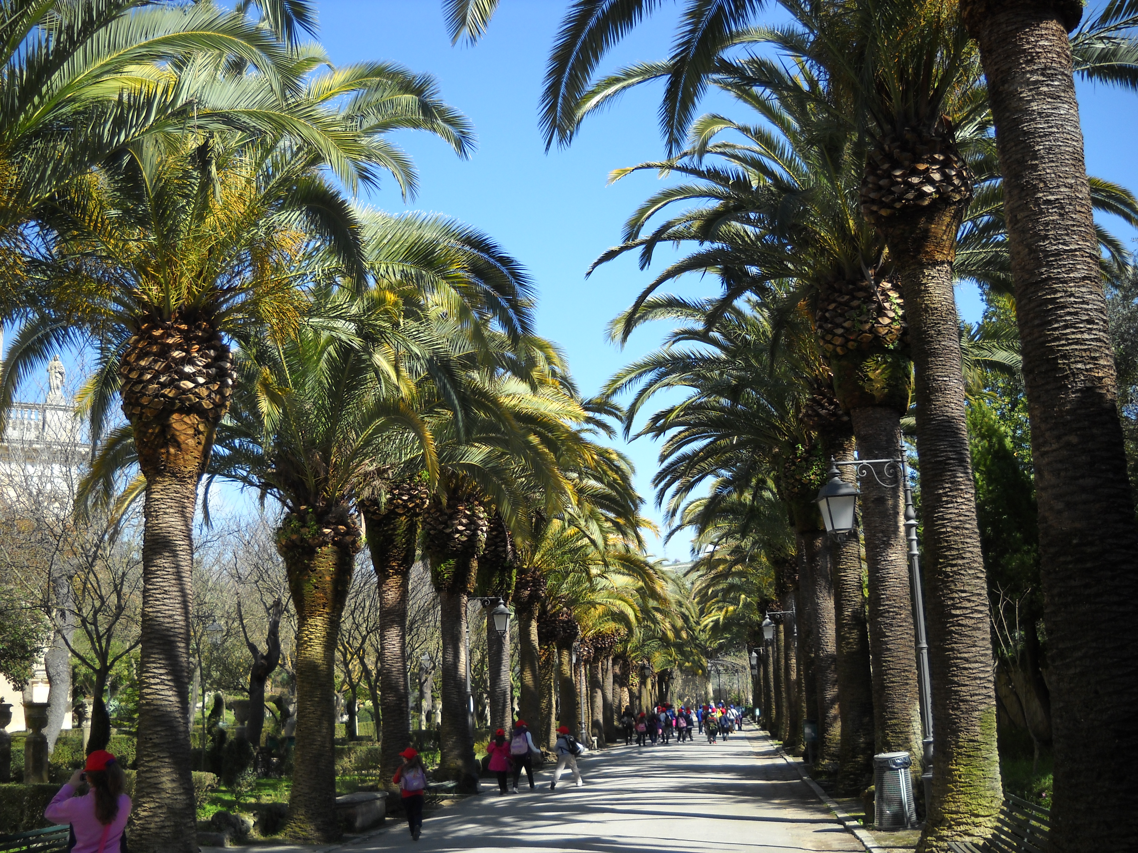 Villa di Ibla This is a photo of a monument which is part of cultural heritage of Italy.